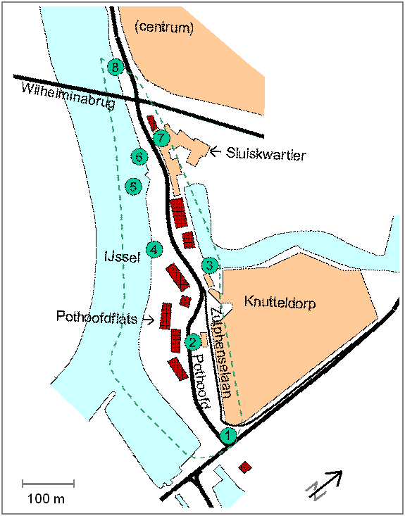 Eigen makelij. Gaarne bron (Wikipedia) en auteur (T.C. Nijeholt) vermelden bij overname / verwijzing.